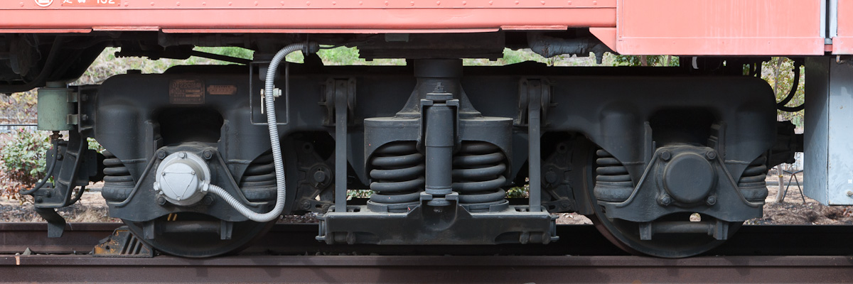 国鉄キハ35形気動車（キハ35 901）のDT22C形台車。碓氷鉄道文化村の保存車。